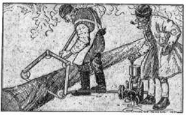 Motorsaga Sector